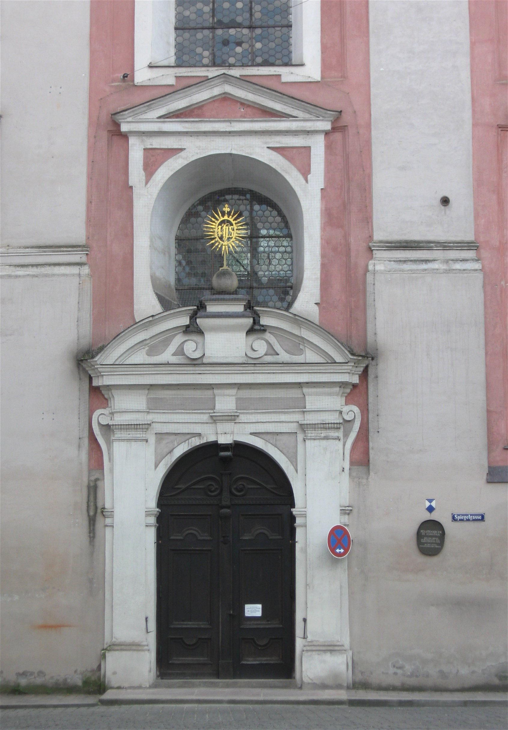 Neustadt 479; Ehem. Jesuitenkirche St. Ignatius, einschiffiger Bau mit wenig eingezogenem Chor, erbaut von Johannes Holl 1631 bis Mitte 17. Jahrhundert, Stukkaturen von Matthias Schmuzer 1640-1641; mit Ausstattung; Borgiaskapelle, im Obergeschoss eines Ausbaues, wohl Mitte 17. Jahrhundert; mit Ausstattung. D-2-61-000-392